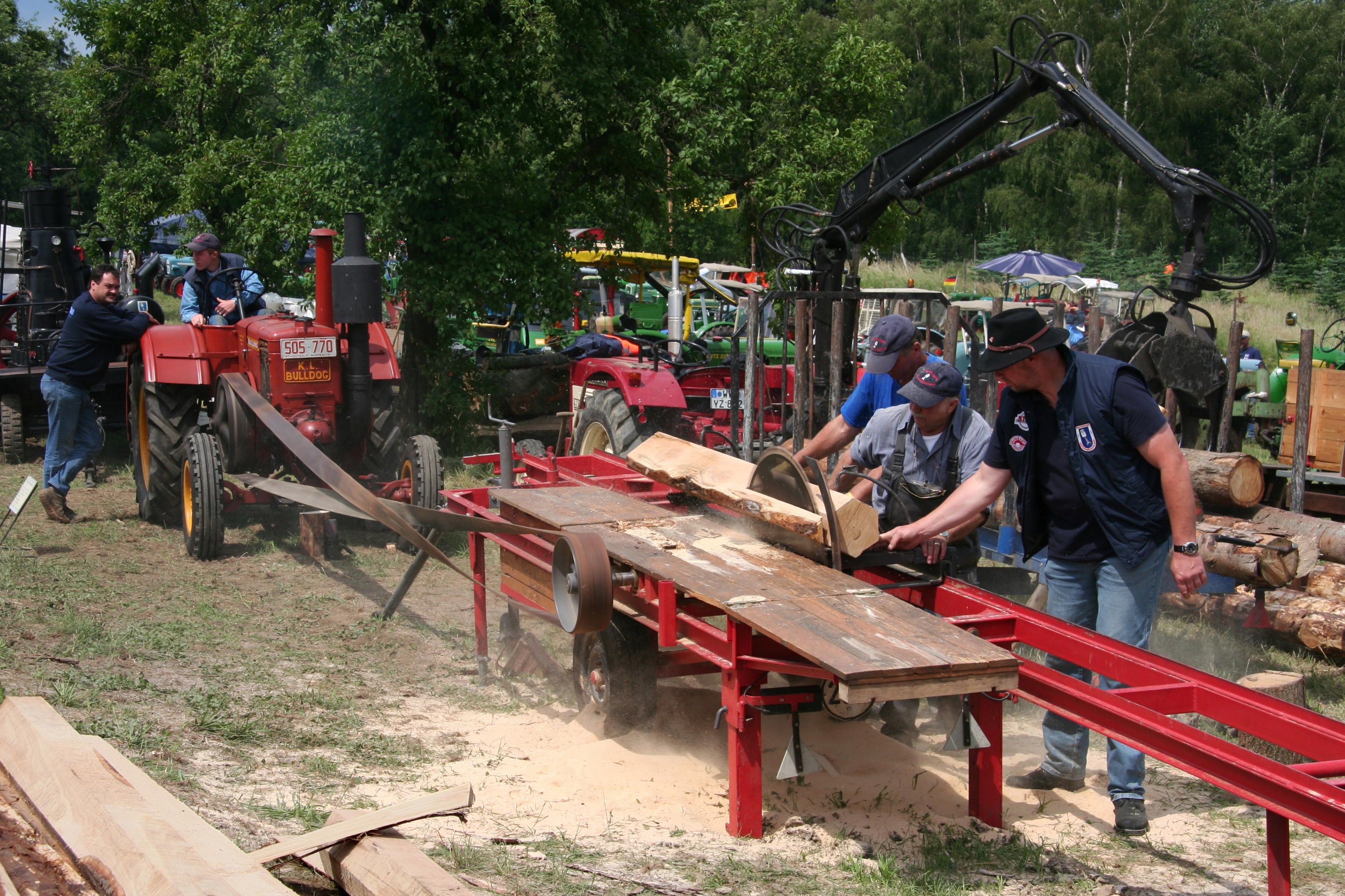 Kelly & Lewis Bulldog treibt beim Traktorentreffen in Hillscheid eine Kreissäge an. Dieser in Australien von 1949 bis 1953 in Lizenz gebaute Traktor entsprach weitestgehend dem Lanz 8506. Etwa 800–1000 Stück wurden hergestellt.)